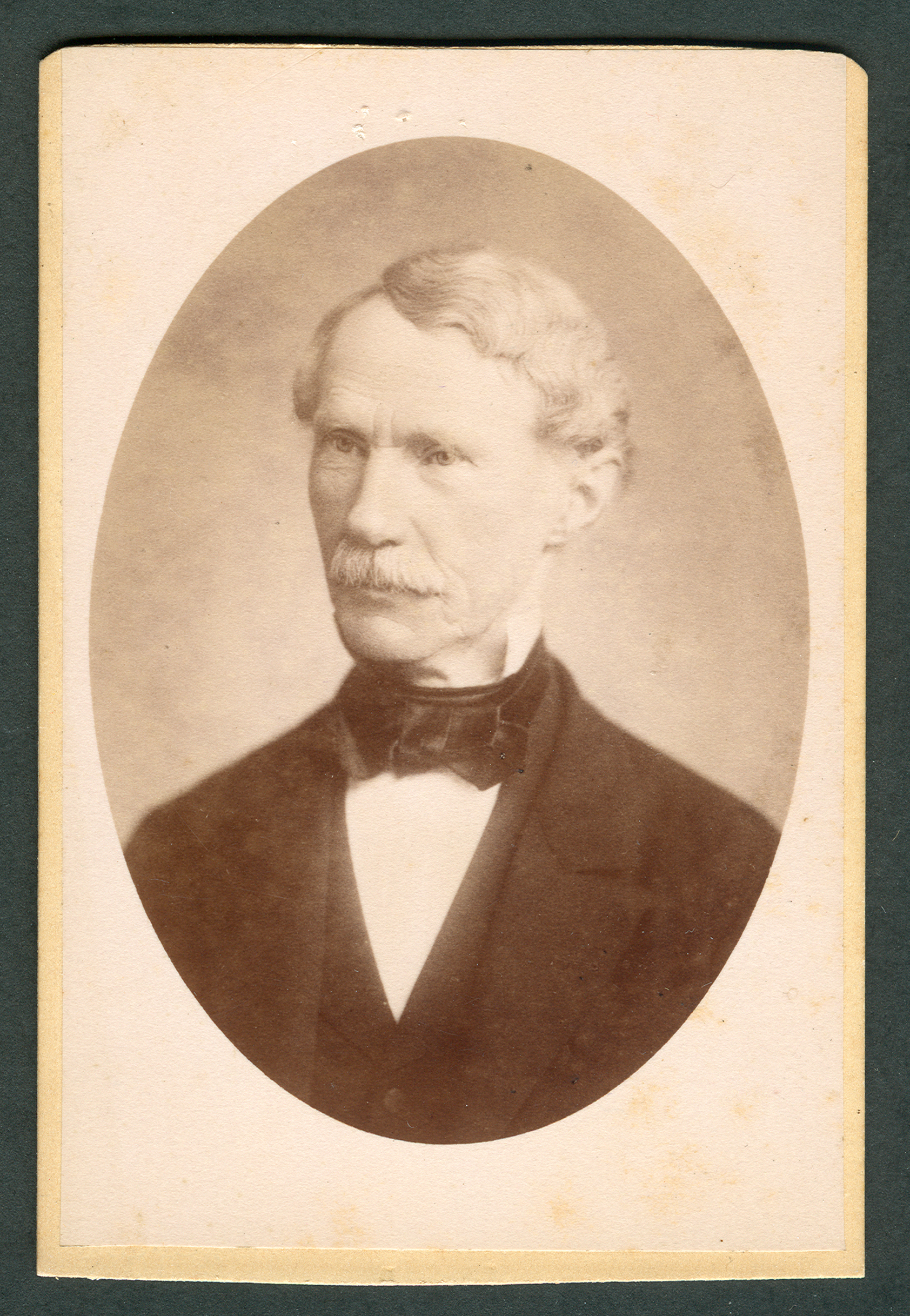 Der Zeichenlehrer aus Hannover, Johann Heinrich Wilhelm Kretschmer, und Tochter Marie Kretschmer, fotografiert von Karl F(riedrich) Wunder. Sohn Heinrich Kretschmer vermachte die Fotos, gemeinsam mit zwei Alben (eins von 1879) mit Bleistiftzeichnungen (meist während einer Schweizreise entstanden) , an die Hausdame von Wilhelm bzw. Marie Kretschmer, Henriette Mantshorst oder Mantehorst. Henriette war eine Schwester der Mutter von Hugo Duensing, der Anfang 1953 in Goslar wohnte. Dessen schriftlich niedergelegter Wunsch war es 1953, daß diese "Dokumente eines früheren Kunstschaffens gehütet werden". Aus Duensings Händen gingen die Werke irgendwann über eBay zurück an den früheren Wohnort von Wilhelm Kretschmer (der später jedoch in Hamburg gelebt haben soll). Happy birthday - Wikipedia! Danke, Hannover! Der hannoversche Zeichenlehrer Wilhelm Kretschmer